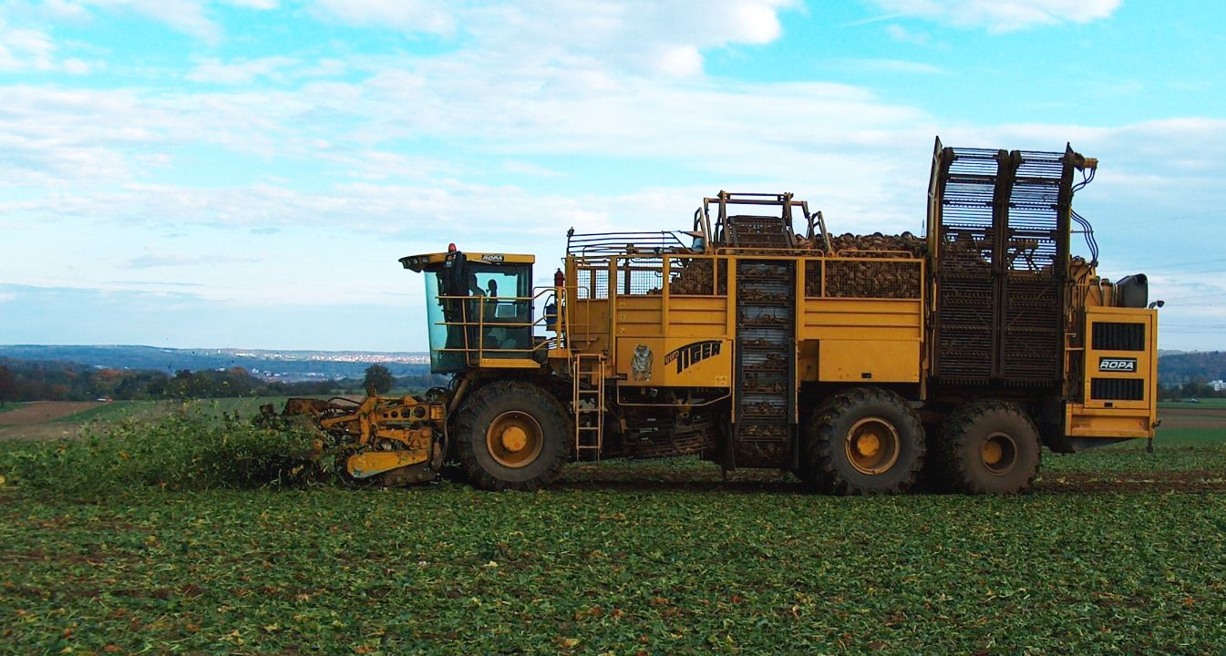 ROPA-Rübenvollernter bei der Ernte von Zuckerrüben